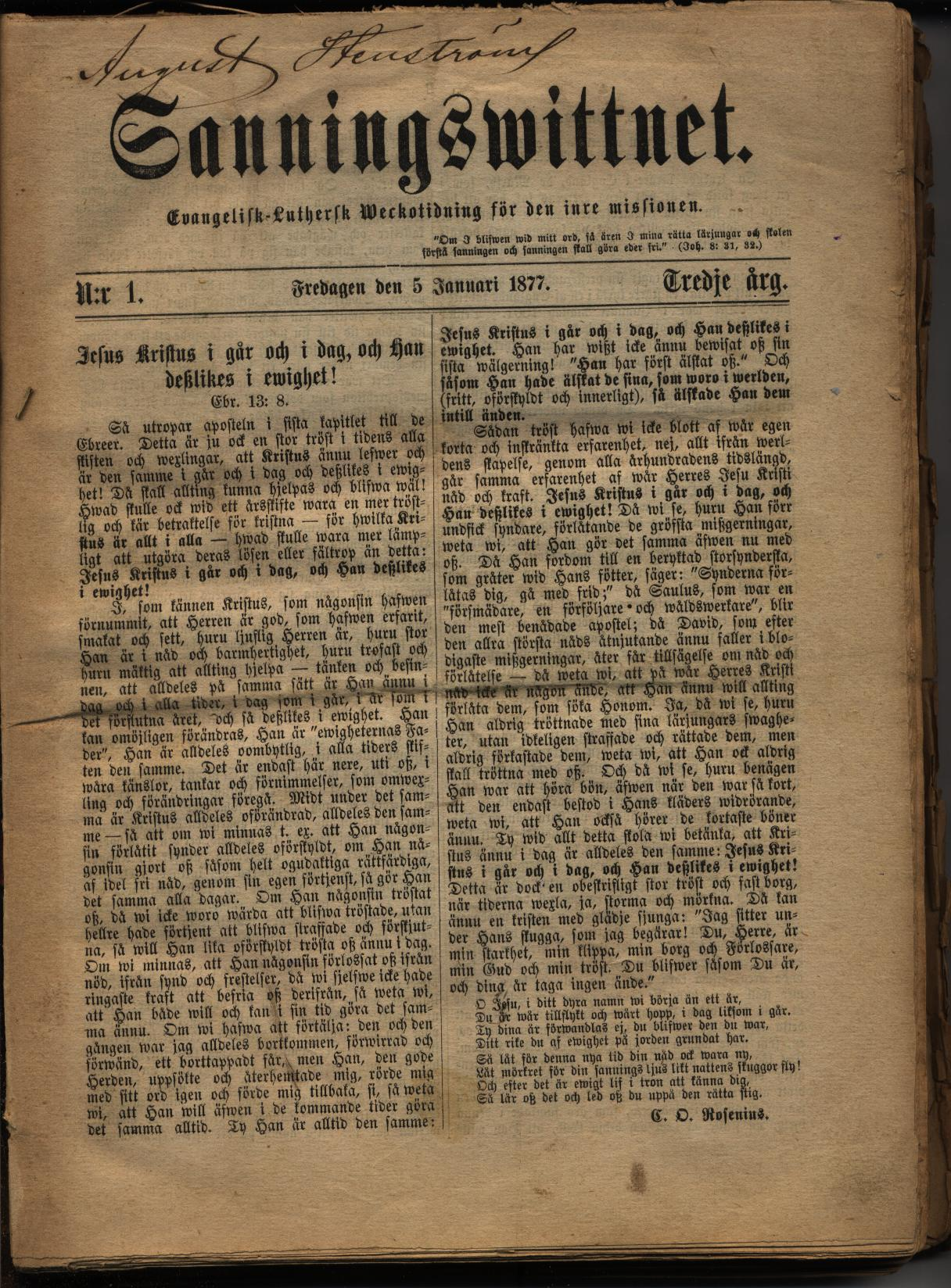 Förstasida till nr 1 1887 (årgång 3) av tidningen Sanningsvittnet med text av Carl Olof Rosenius (1816-1868). Originalet är i Tubaists ägo.